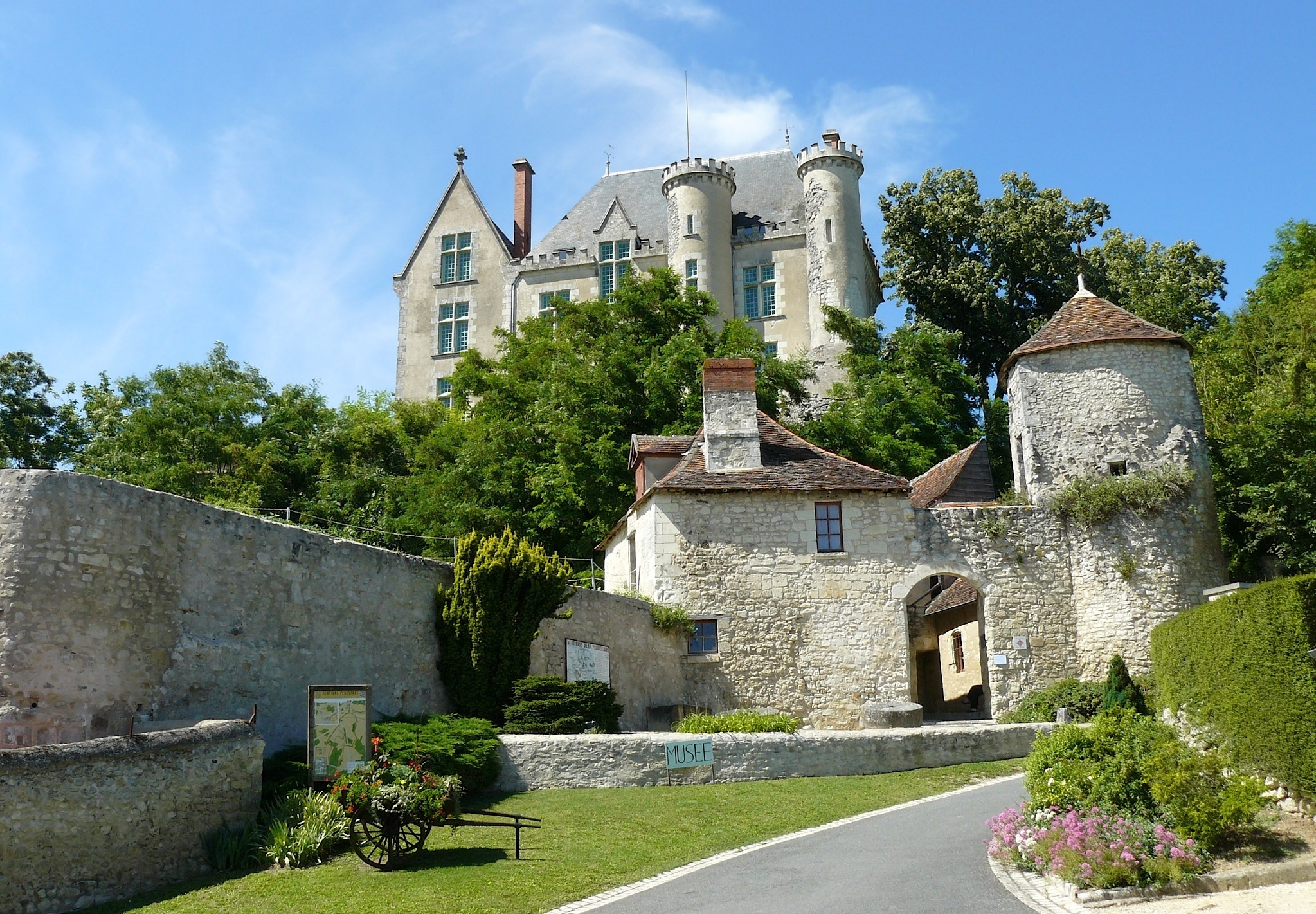 Musée de la Poterne, ancienne entrée du château des Lions à Preuilly-sur-Claise (XIVe - XVe)